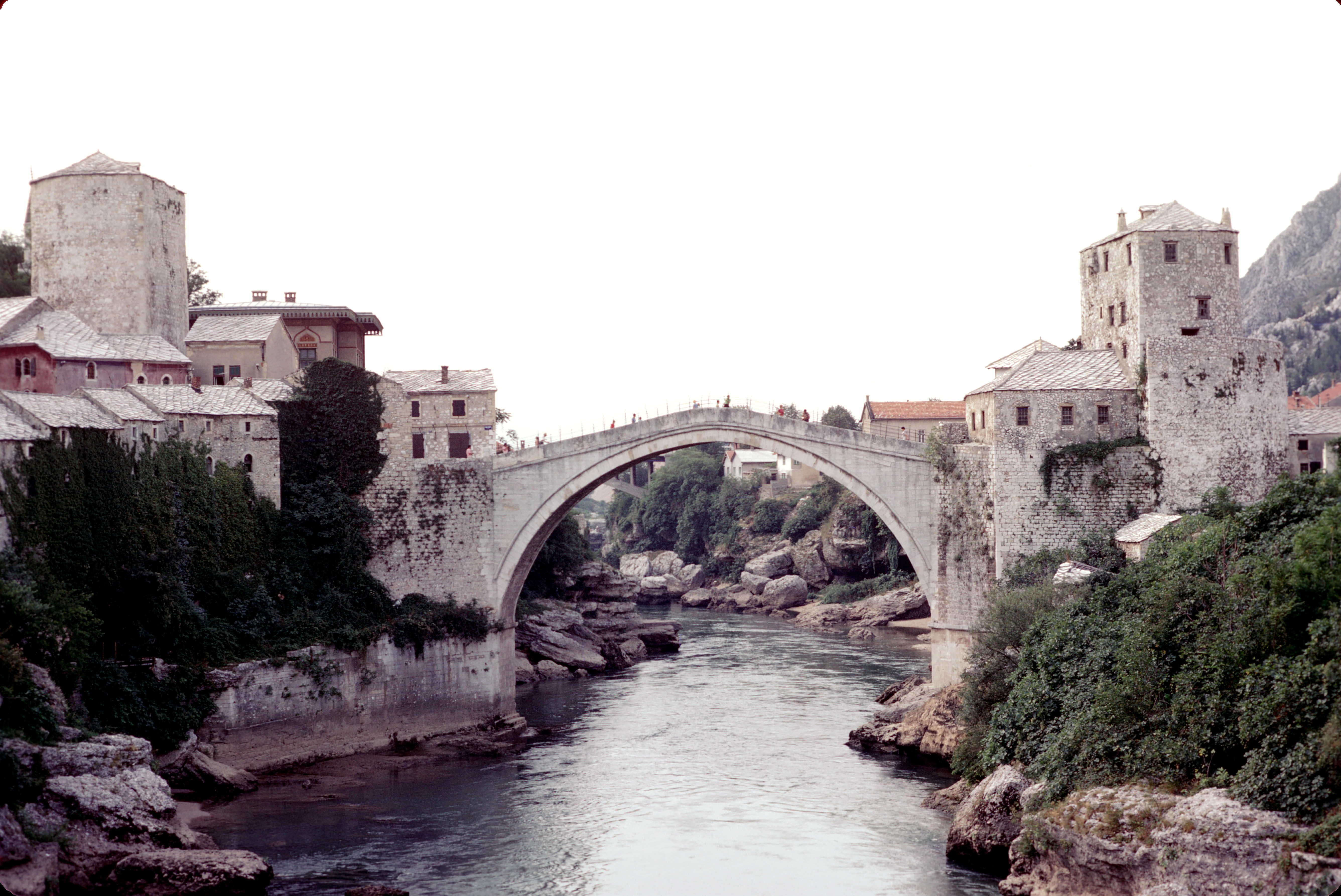 Le Vieux Pont de Mostar (en 1974) enjambant la rivière Neretva. Ce pont en dos d' âne construit en 1565 a été détruit par les forces croates du HVO en novembre 1993 et reconstruit en 2003-2004. Mostar, Bosnie-Herzégovine (partie de l' ex-Yougoslavie en 1974).